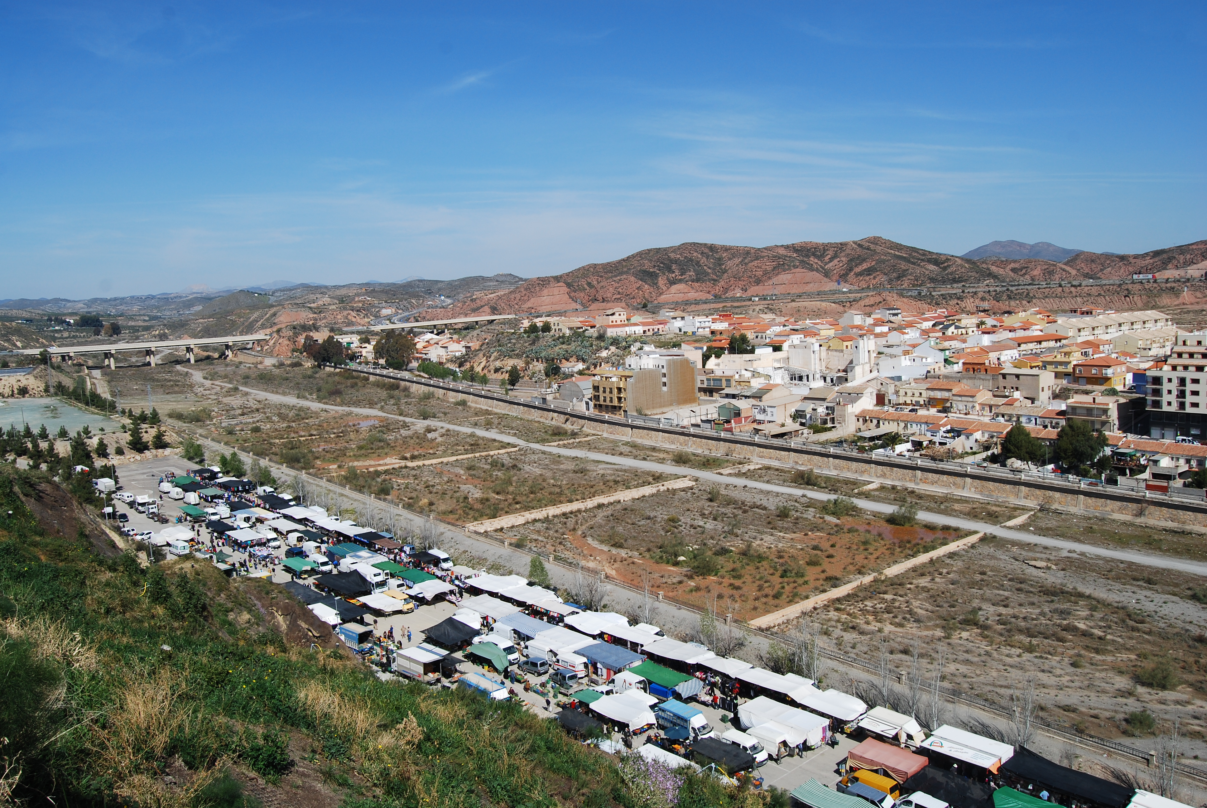 Vista de la Rambla de Nogalte y el mercado semanal, Puerto Lumbreras.